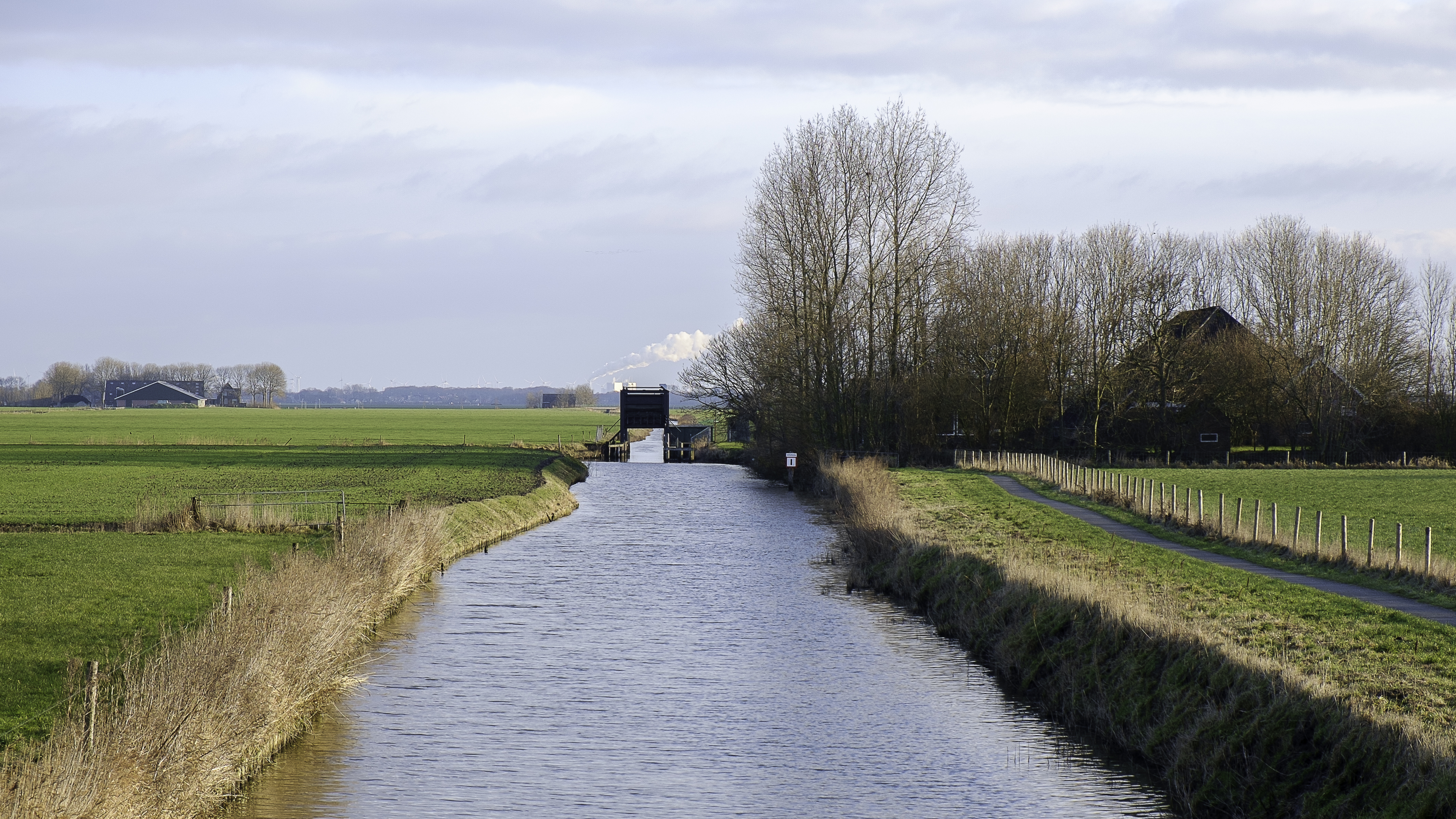 Usquerdermaar bij de vuilstort